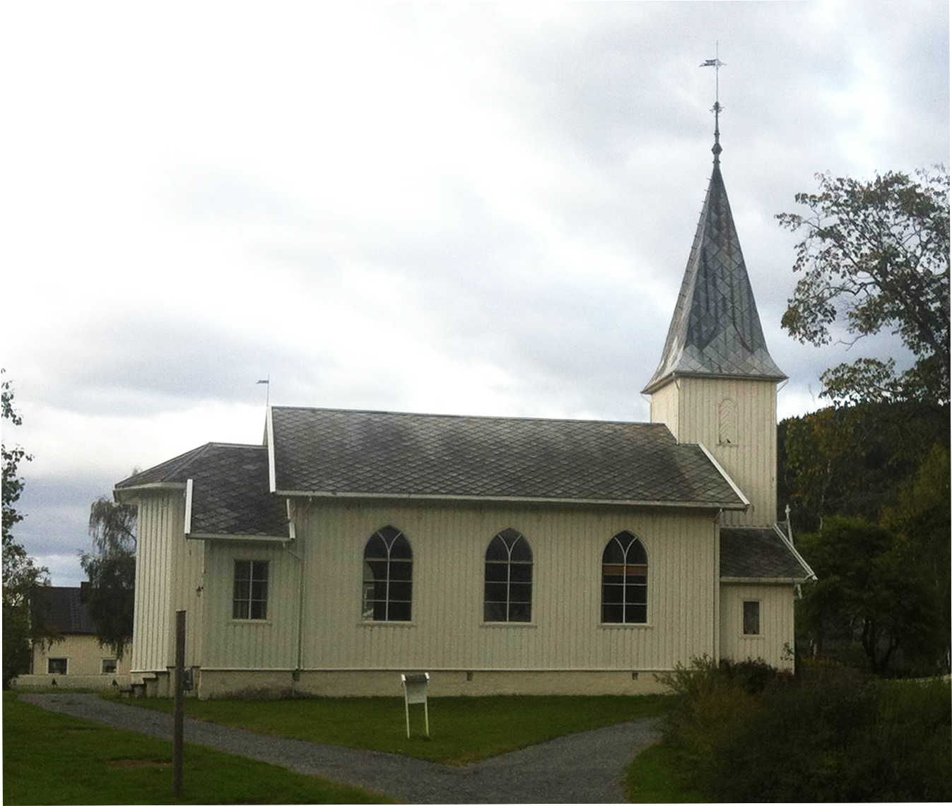 Orkanger kirke fotografert i 2013